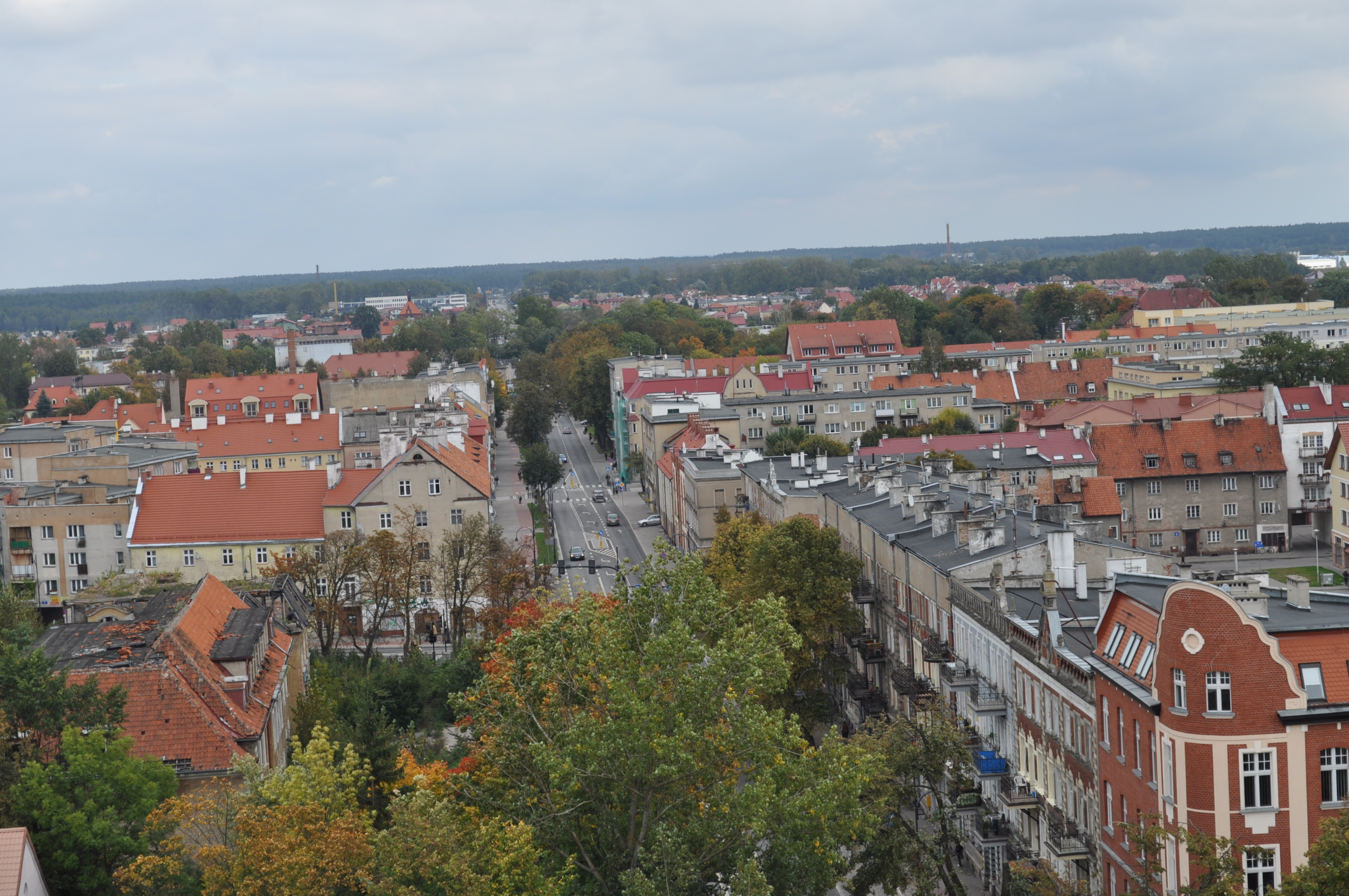 Widok na ulicę Mickiewicza